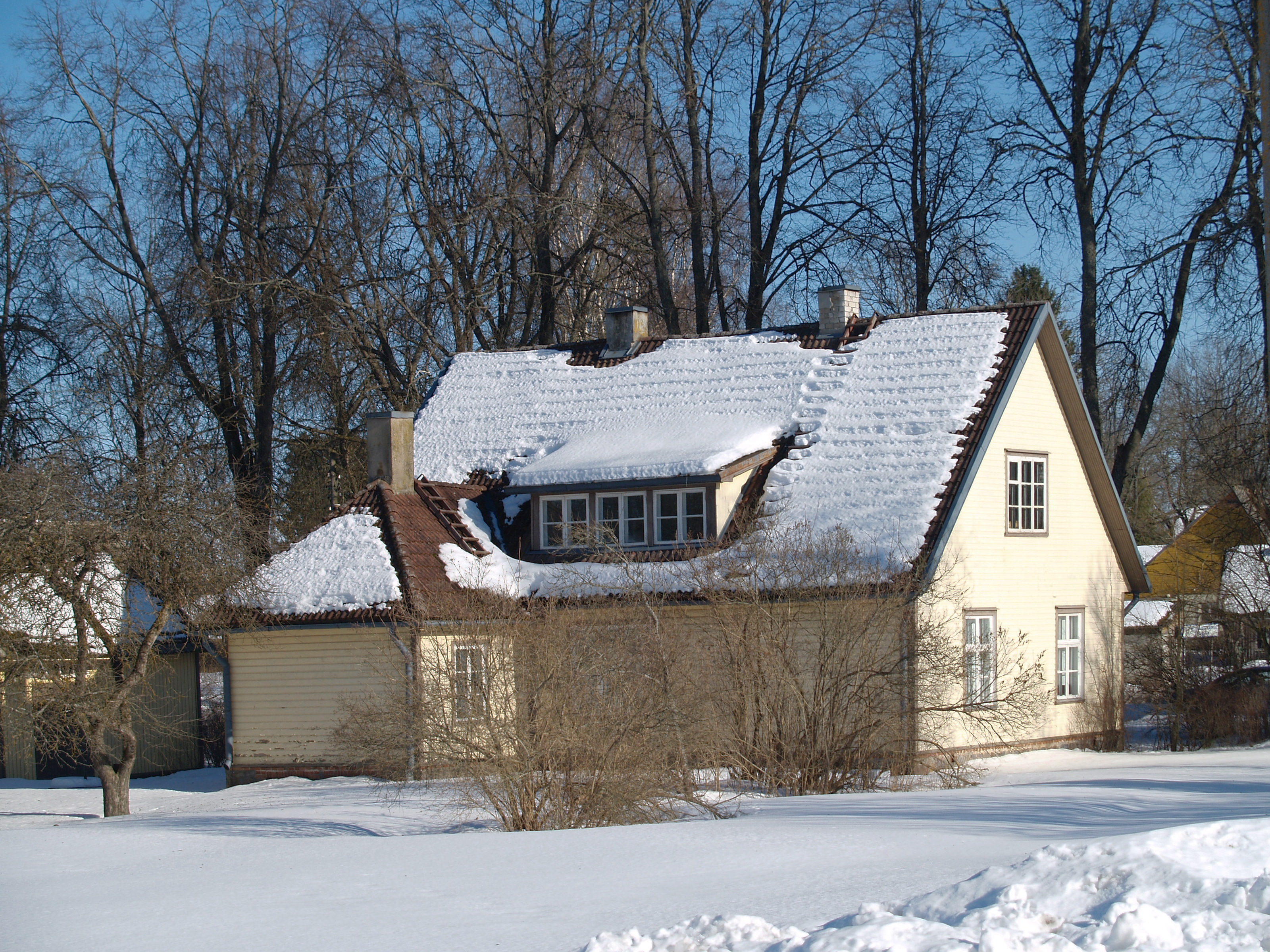 Heliloojate Kappide Majamuuseum